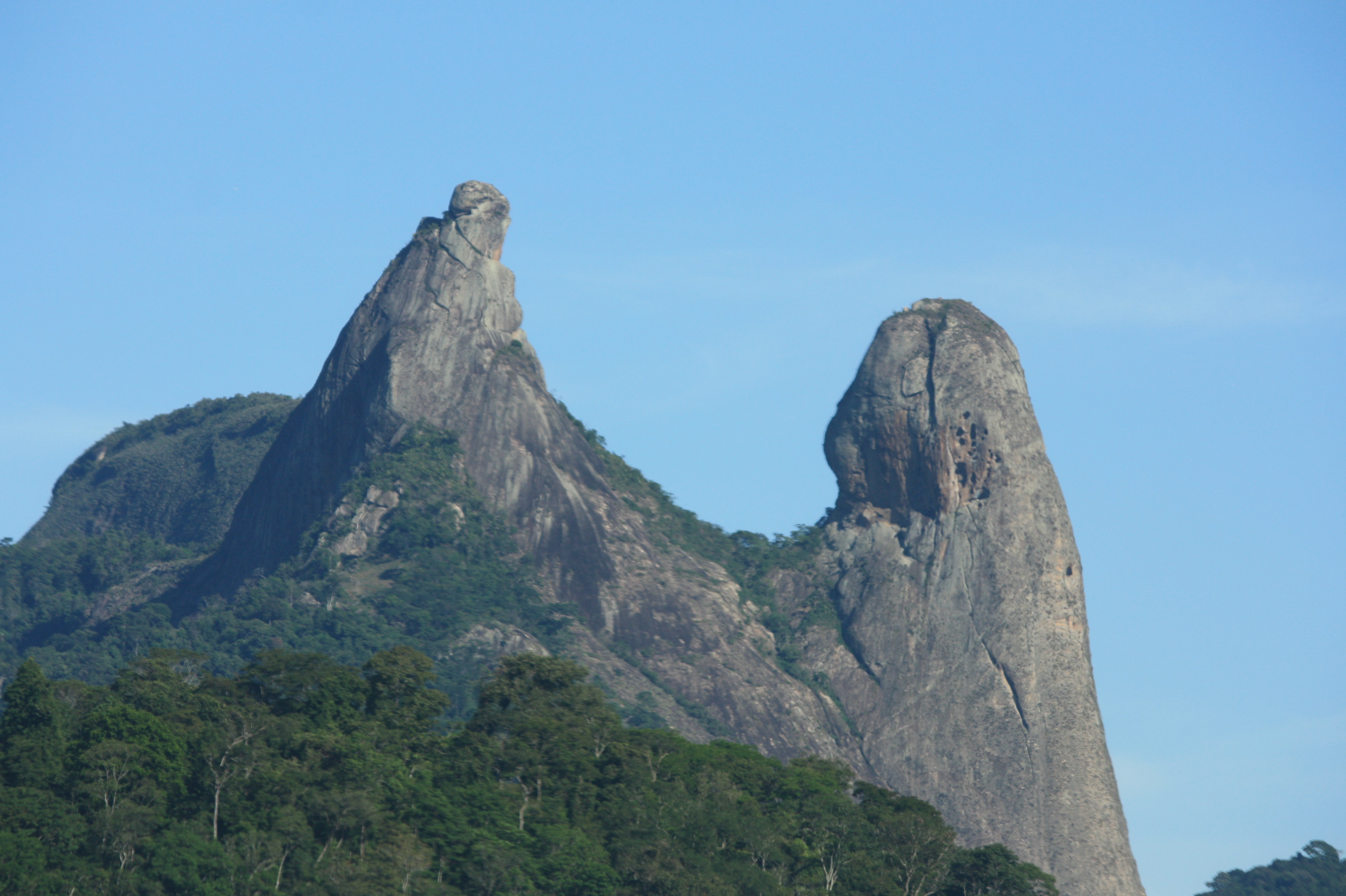 pedra O Frade e a Freira